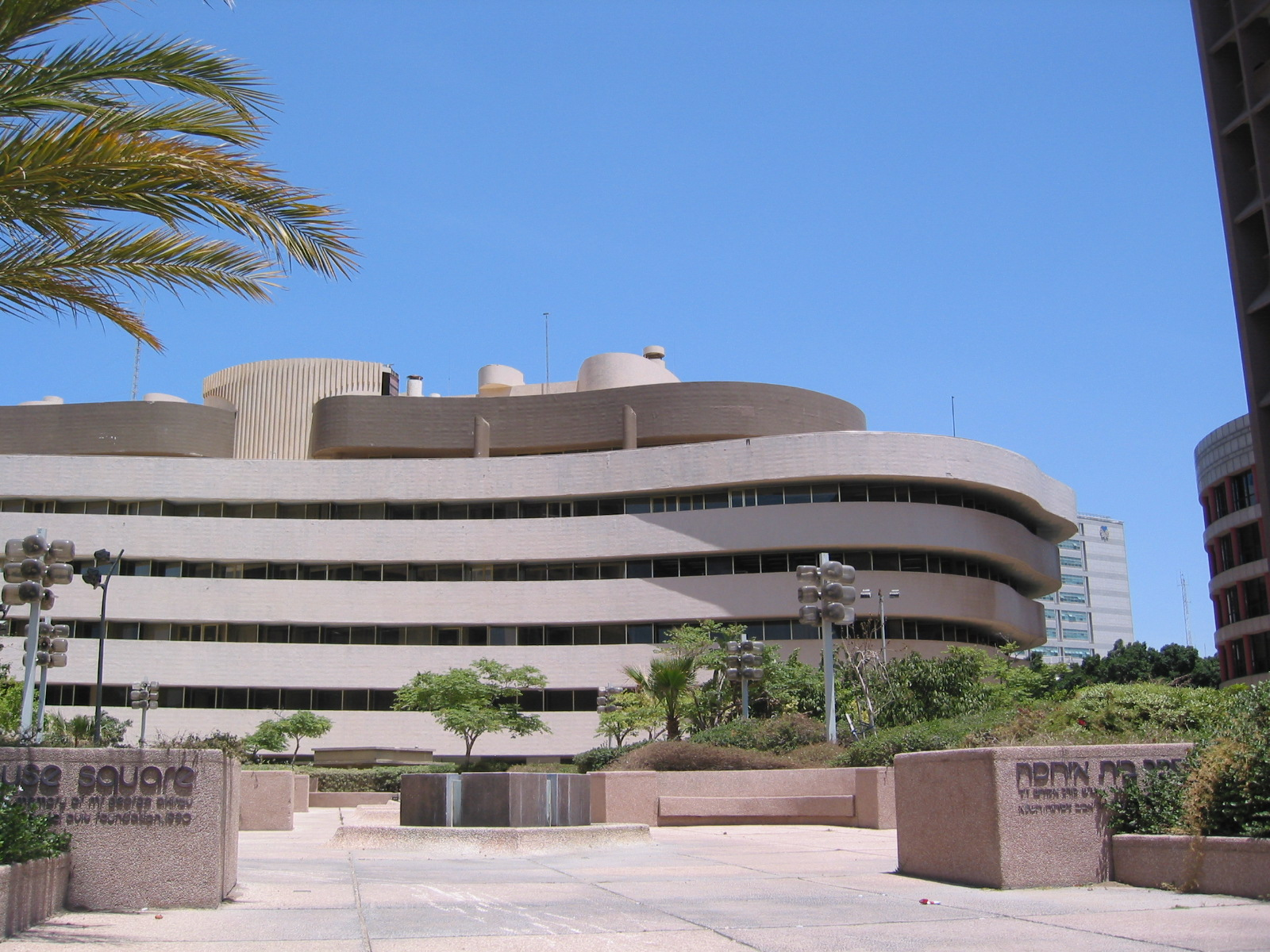 Asia House, Tel Aviv